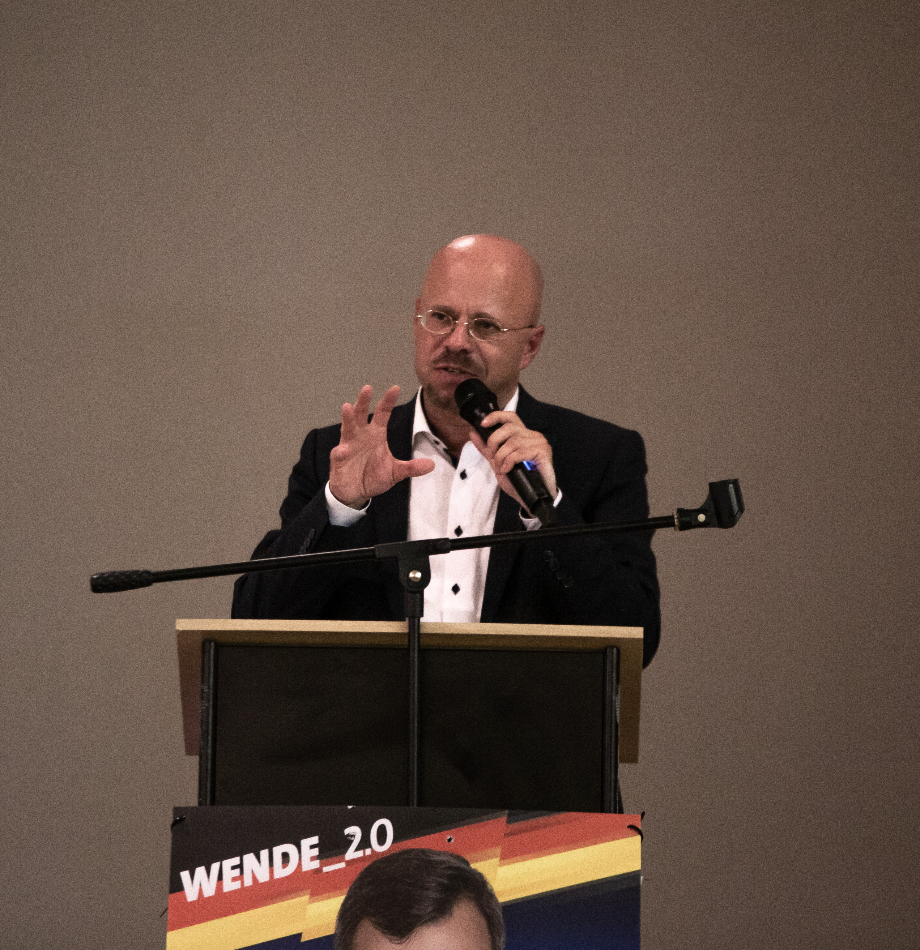 Andreas Kalbitz auf einer Wahlkampfveranstaltung zur Thüringer Landtagswahl 2019 in Nordhausen